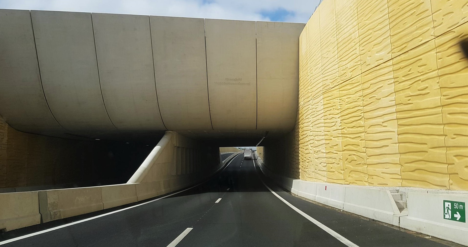 Akwadukt Van Harinxmakanaal N31 bij Harlingen